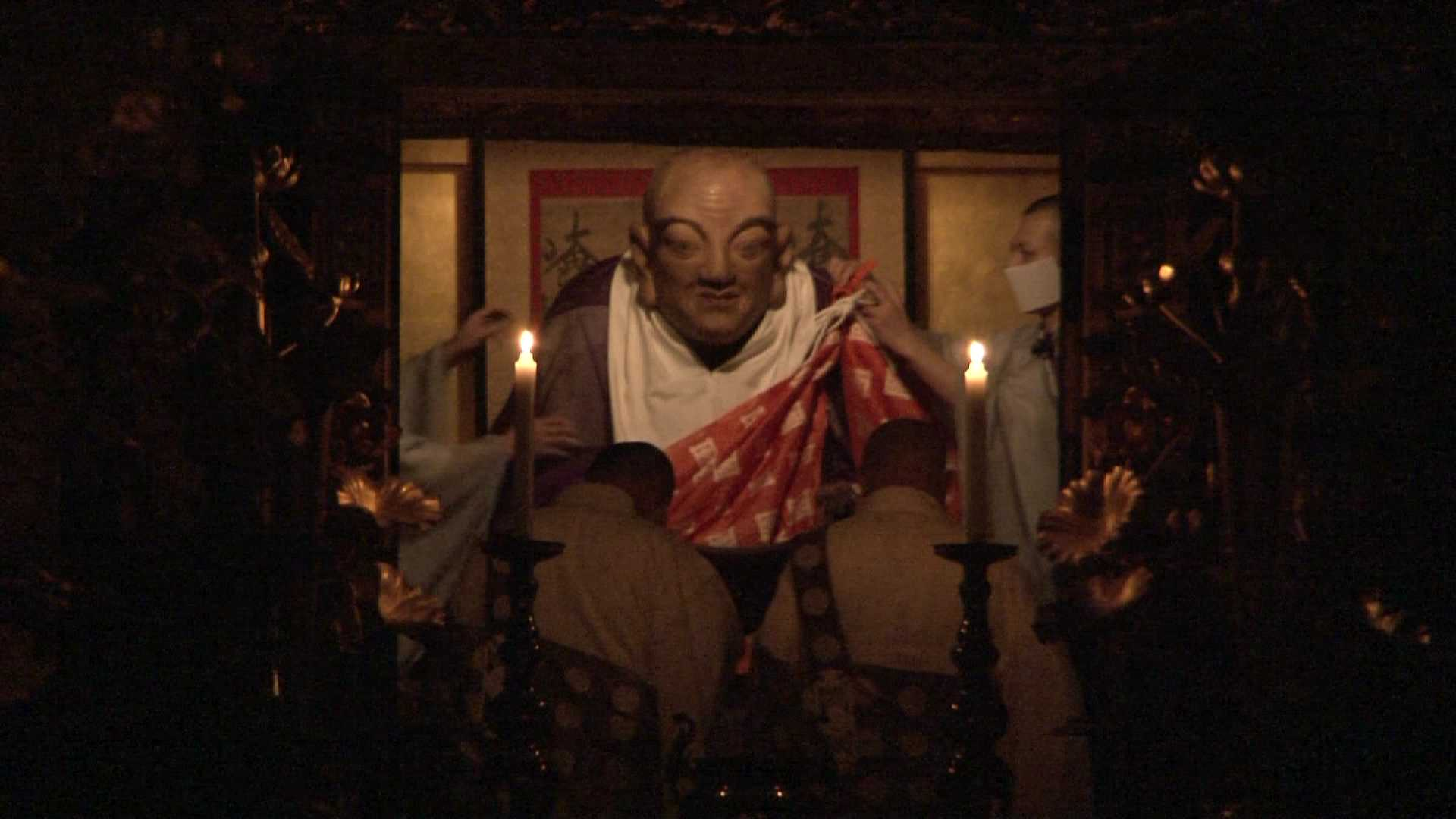 身延山久遠寺祖師堂の御影